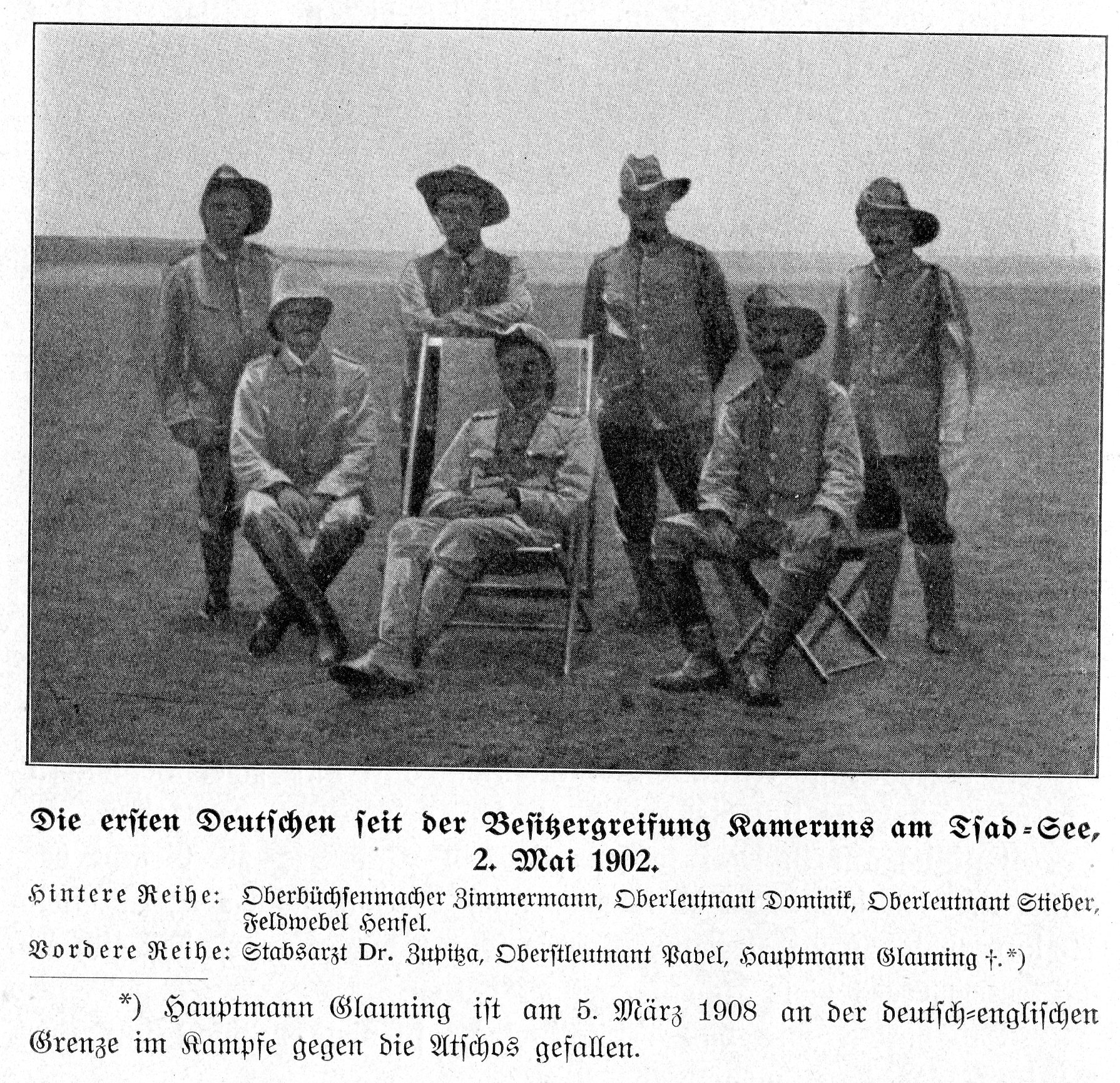 Angehörige der Schutztruppe Kamerun am Tschadsee im Mai 1902. Untere Reihe rechts Hauptmann Hans Glauning (1868-1908). Aus: Oscar Zimmermann: Durch Busch und Steppe Berlin 1909, Seite 206.